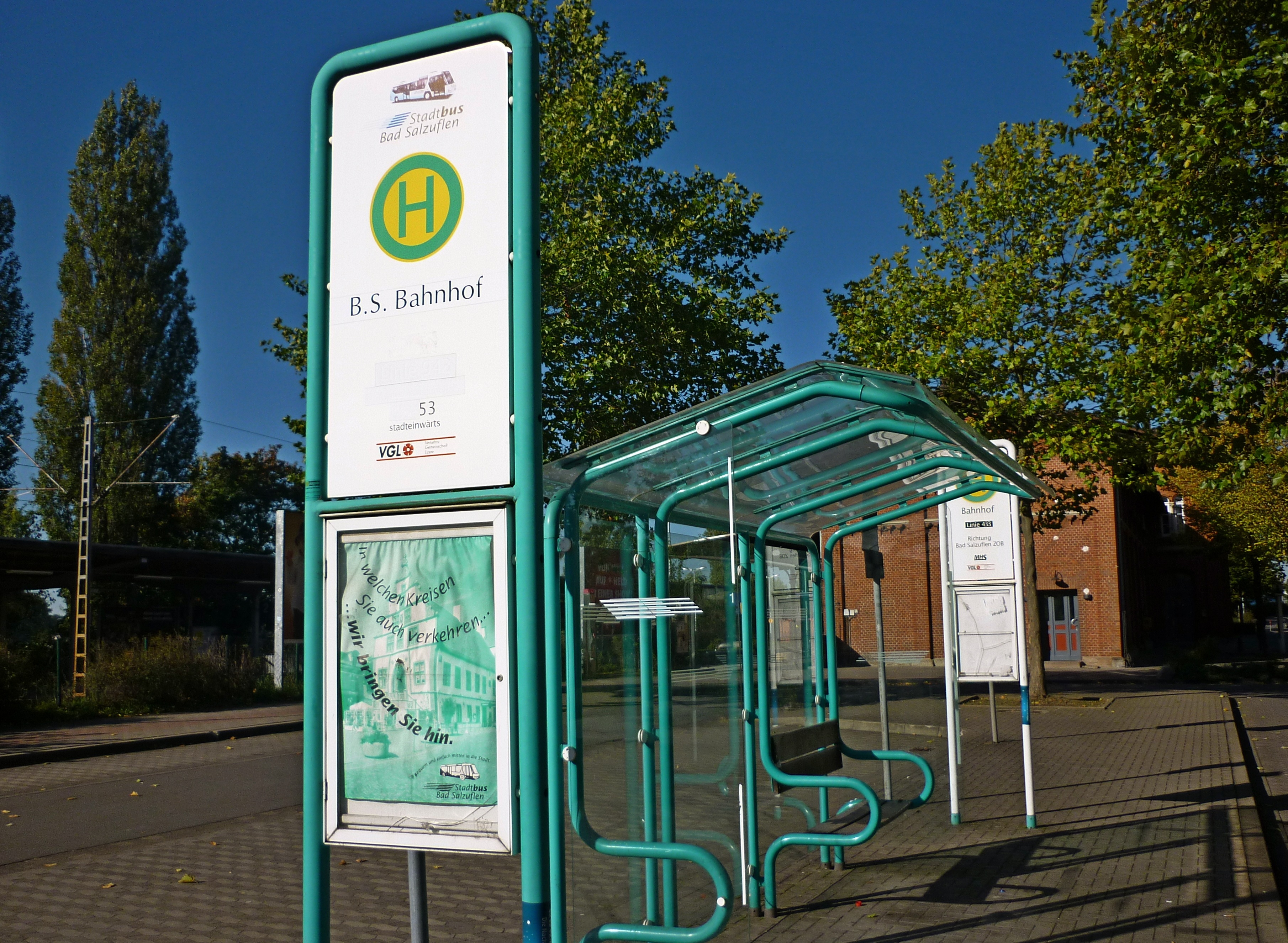 Bad Salzuflen, Stadtbus-Haltestelle am Bahnhof mit Logo der ehemaligen Verkehrsgemeinschaft Lippe (VGL).